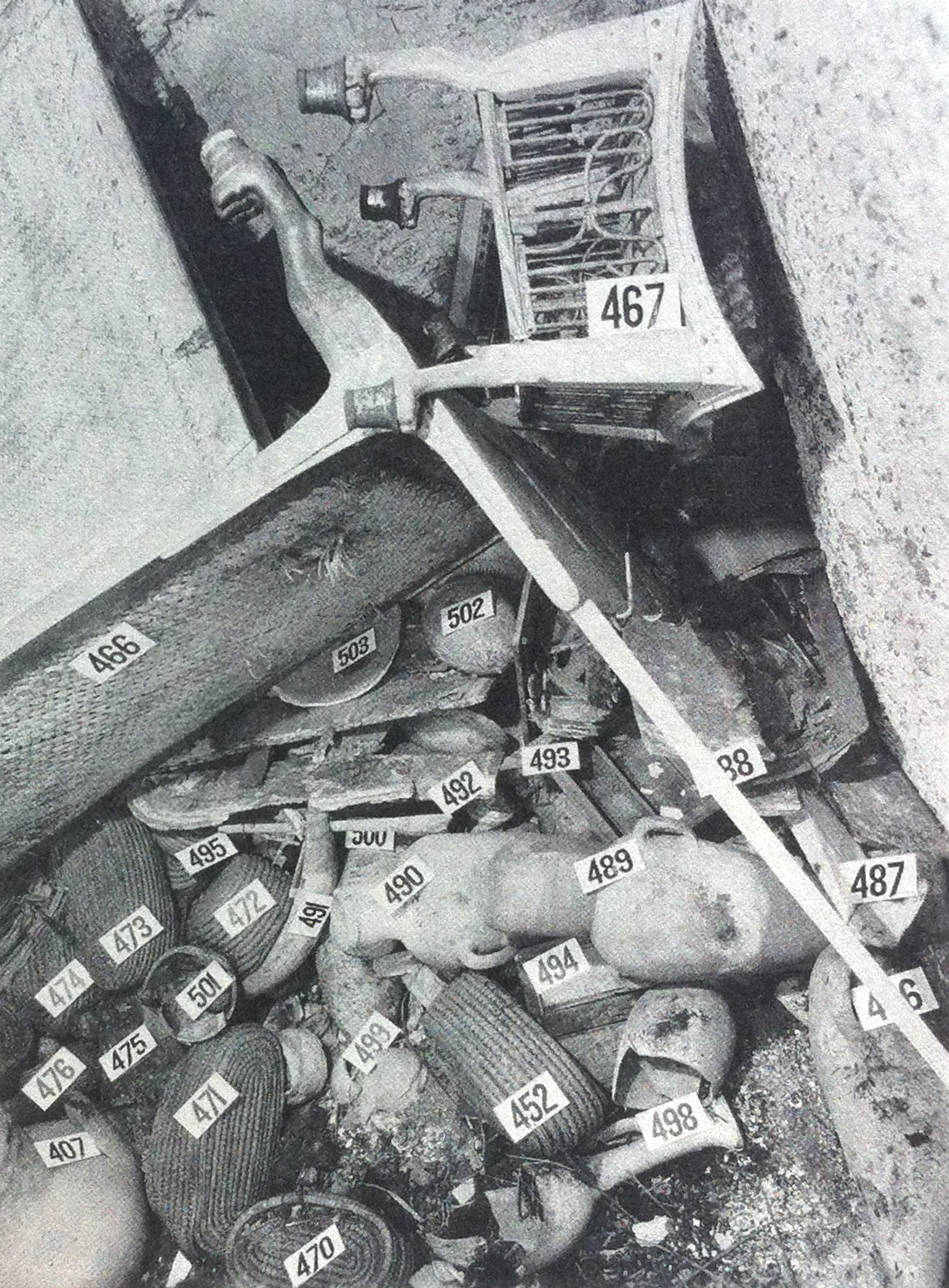 Amphores de la tombe de Toutankhamon